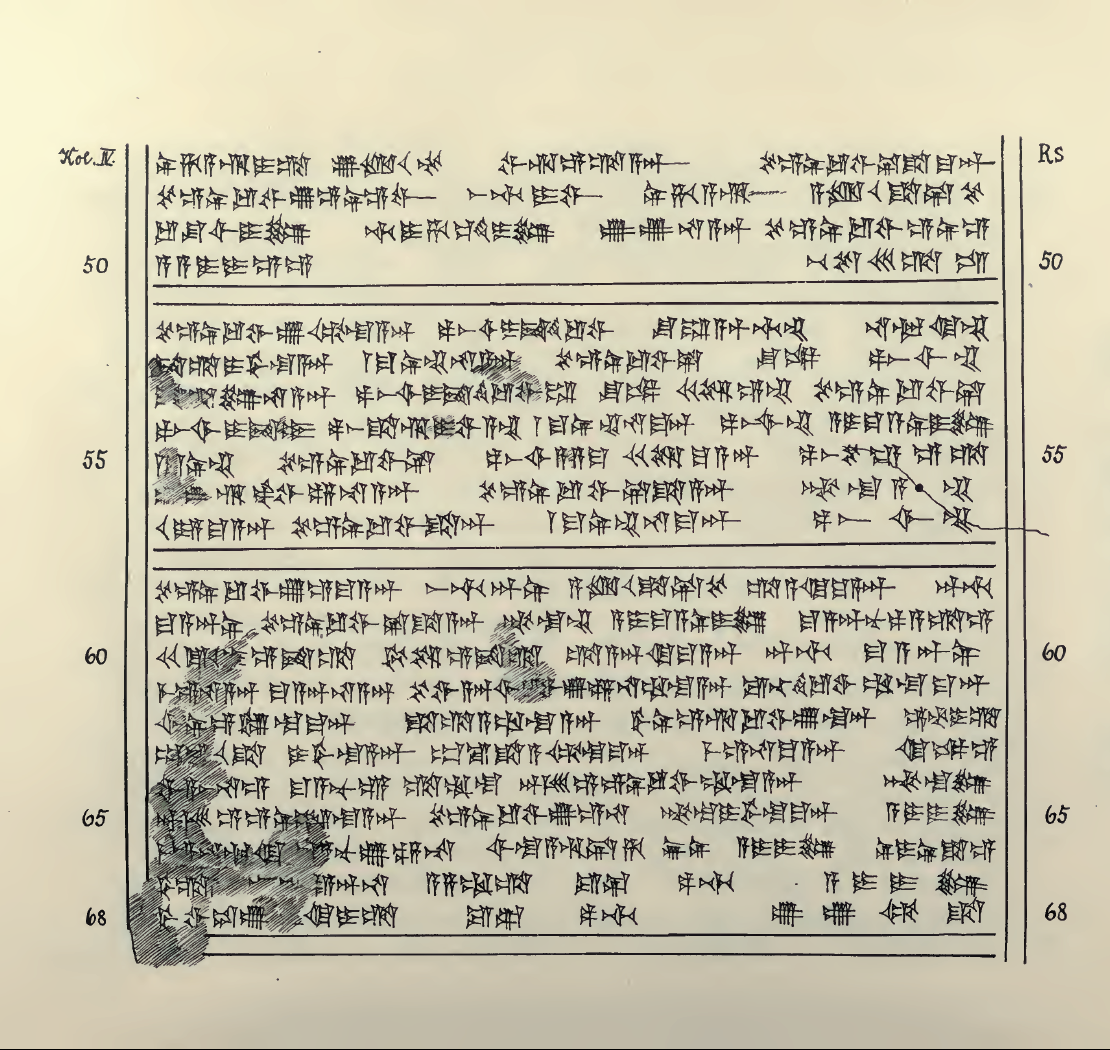 List Tuszratty do Amenhotepa III w języku huryckim – autografia.